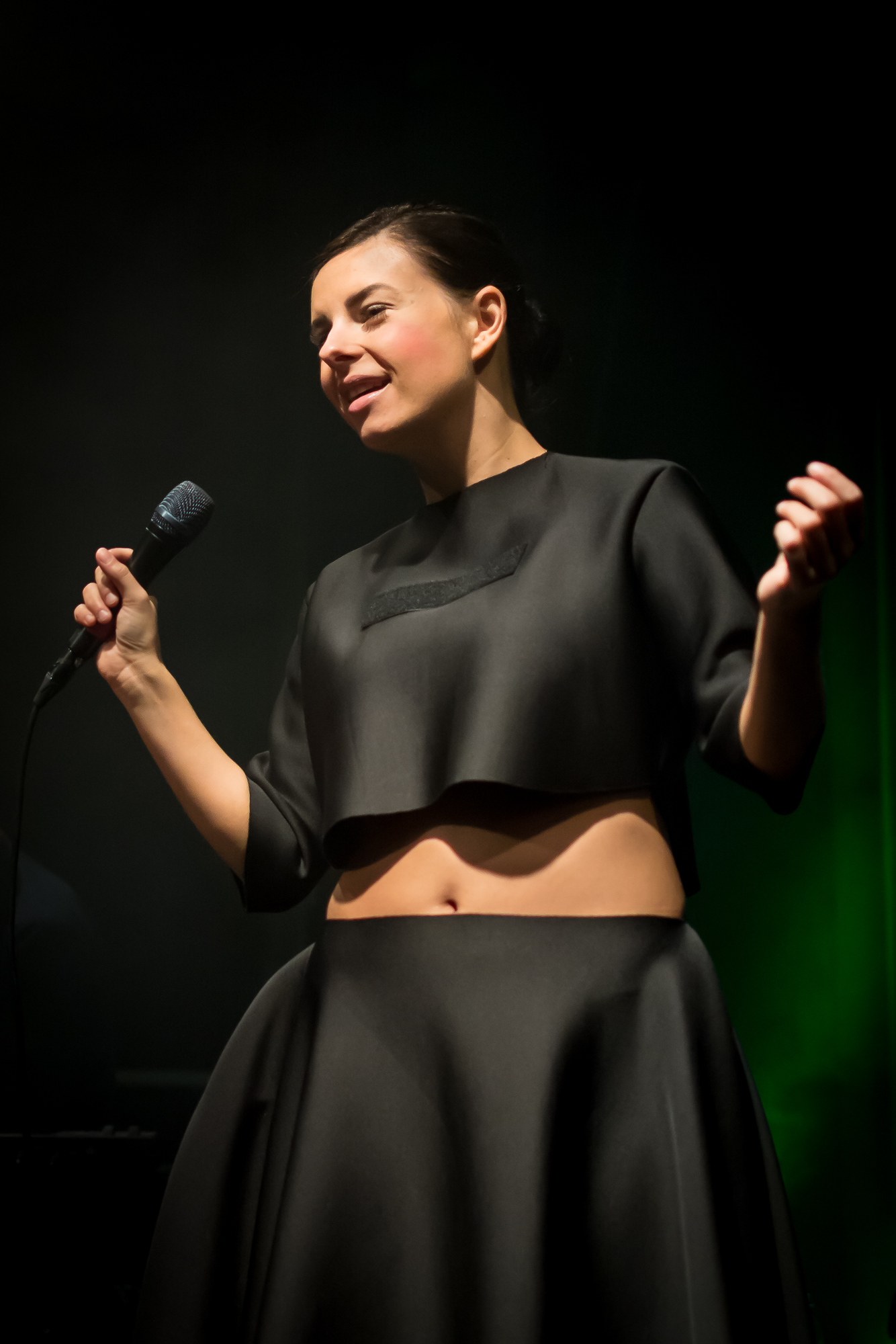 Balbina im clubCANN in Stuttgart Bad Cannstatt.